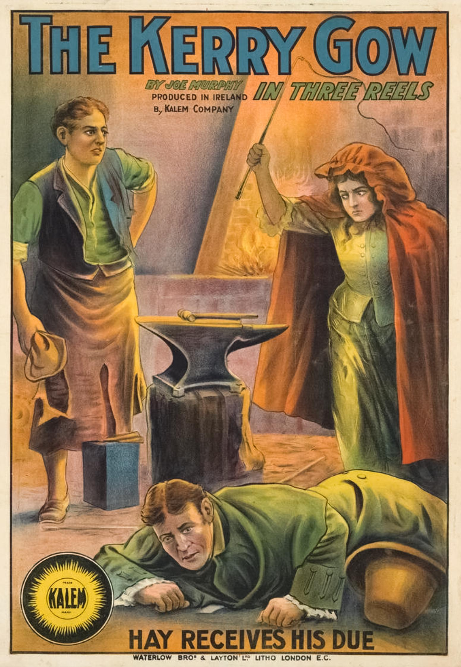 Affiche de cinéma